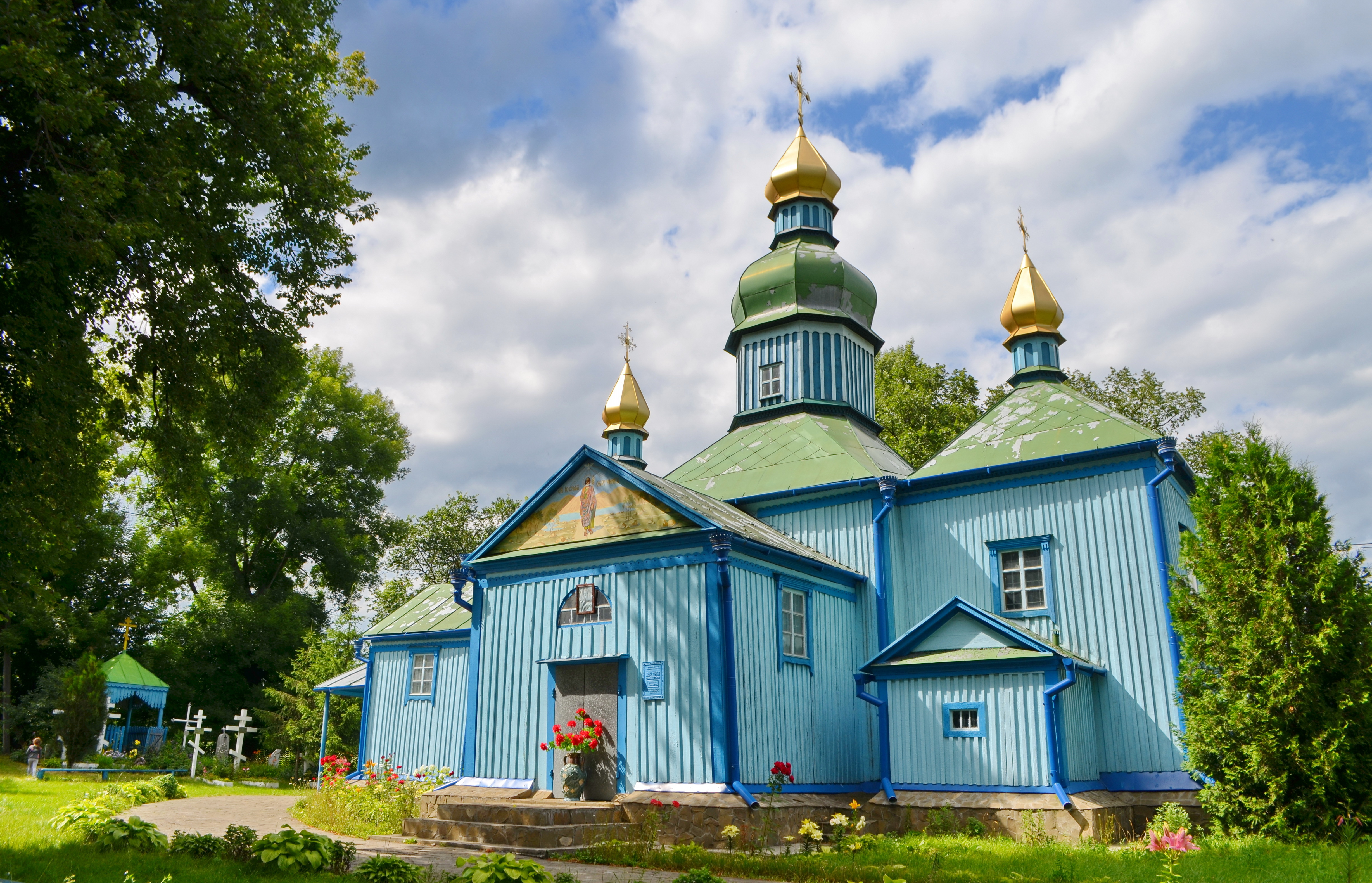 Житні Гори. Церква Йосипа Обручника. 1766 р. Наддніпрянська архітектурна школа українського народного зодчества.